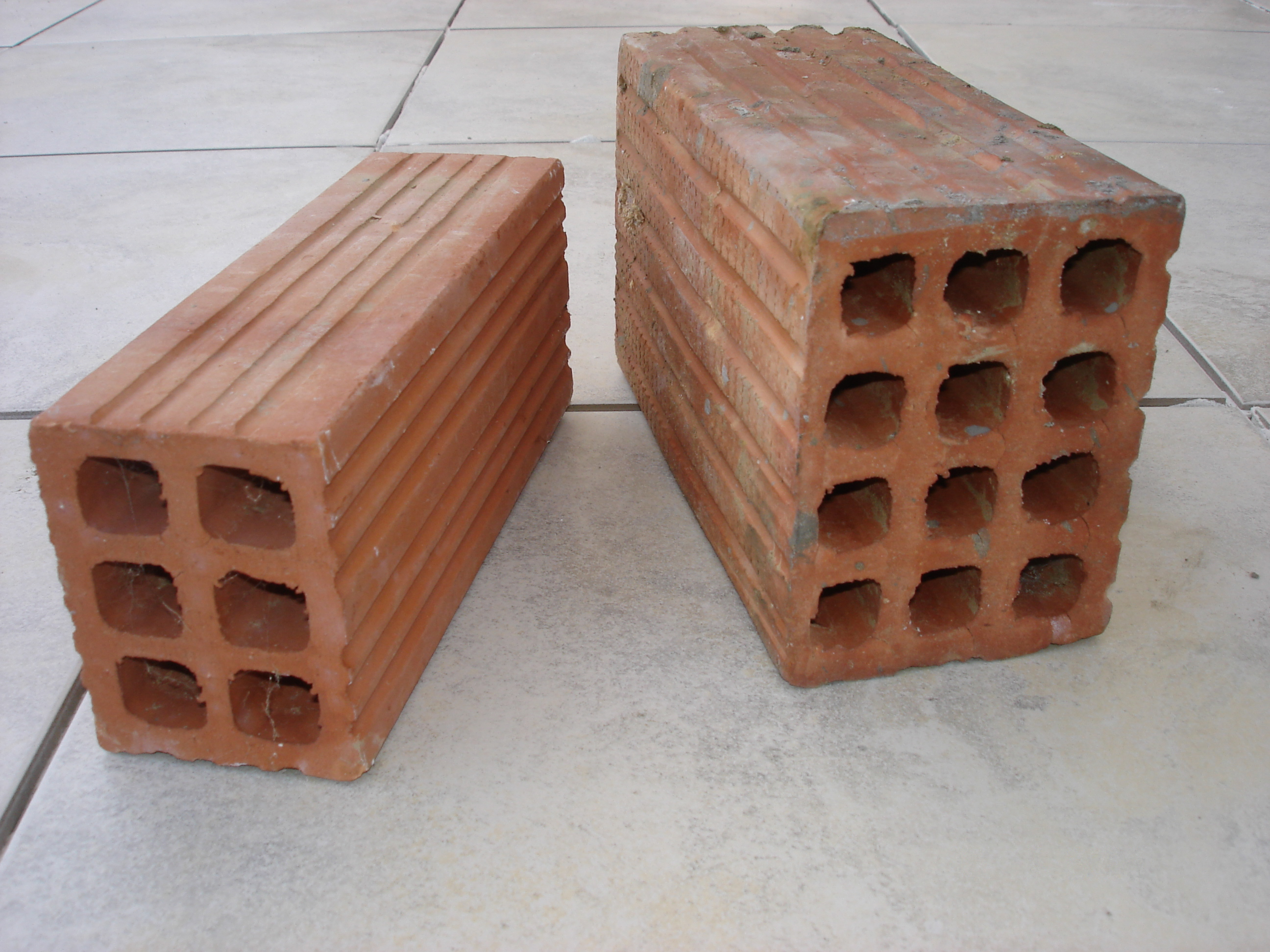 Τούβλα